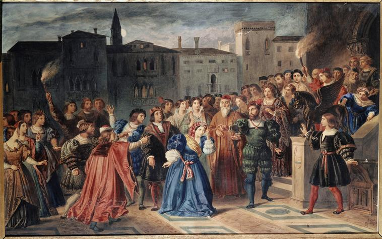 Scène de l'affront ("Lucrèce Borgia", acte I, scène V)